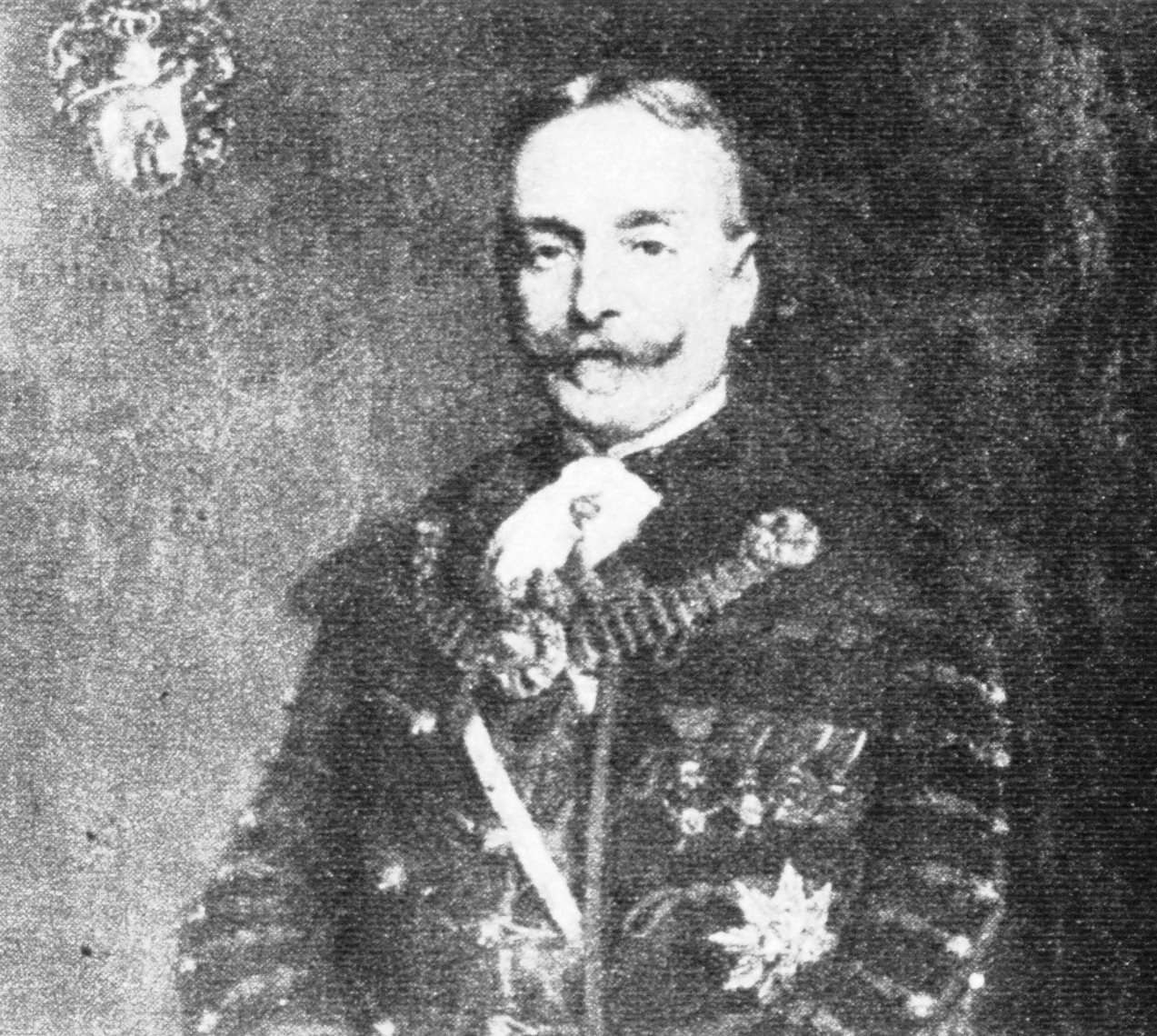 Tallián Béla földművelődésügyi miniszter. Balló Ede festménye